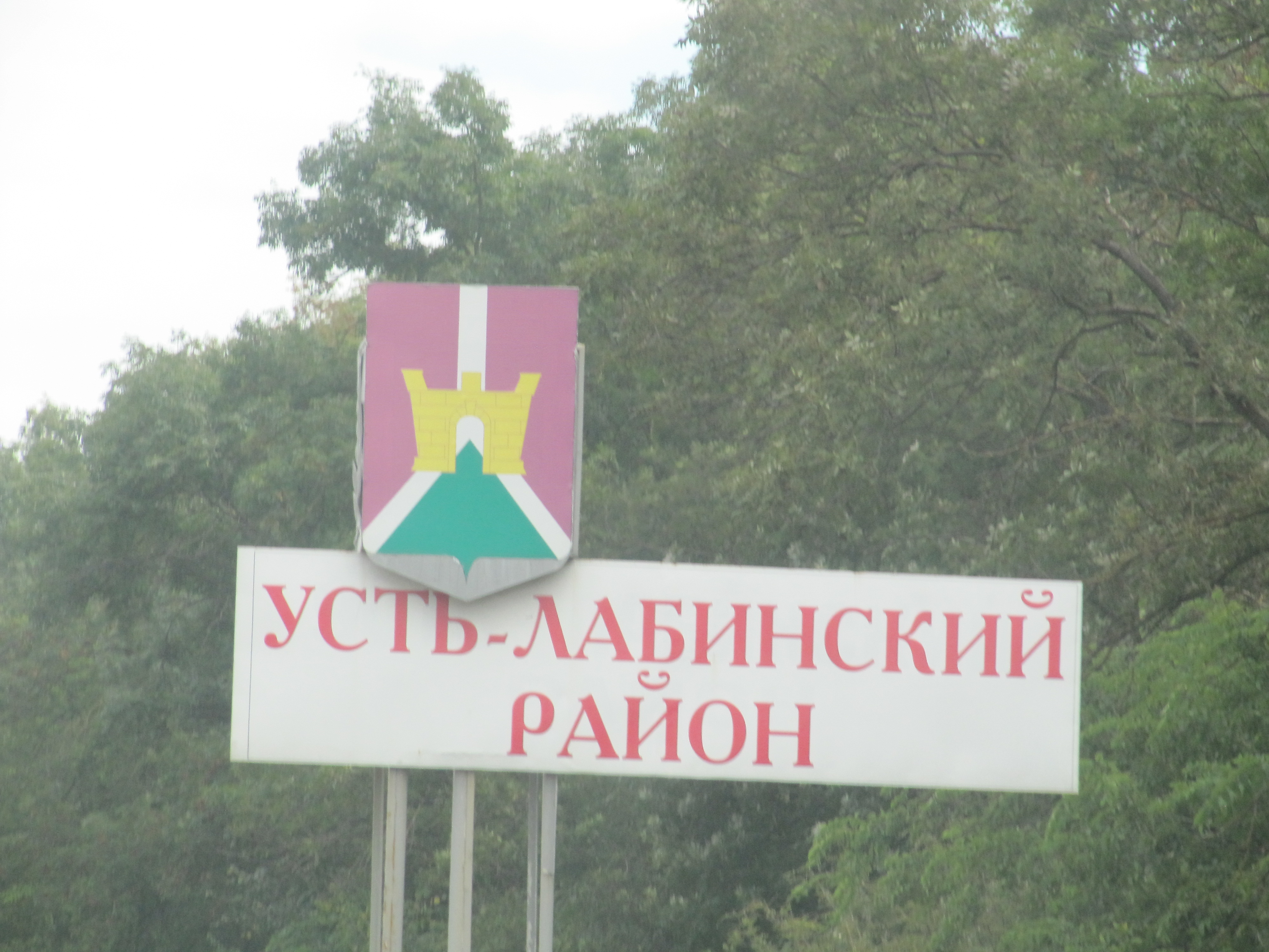 Дорожный указатель, Усть-Лабинский район, Краснодарский край, Россия